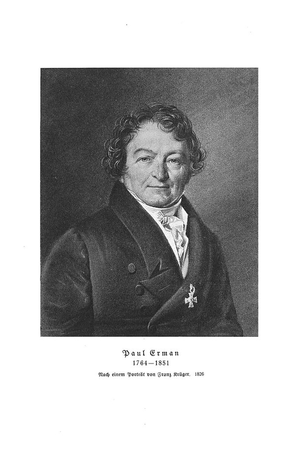 Paul Ermann (* 29. Februar 1764 in Berlin; † 11. Oktober 1851 in Berlin) war ein deutscher Physiker.